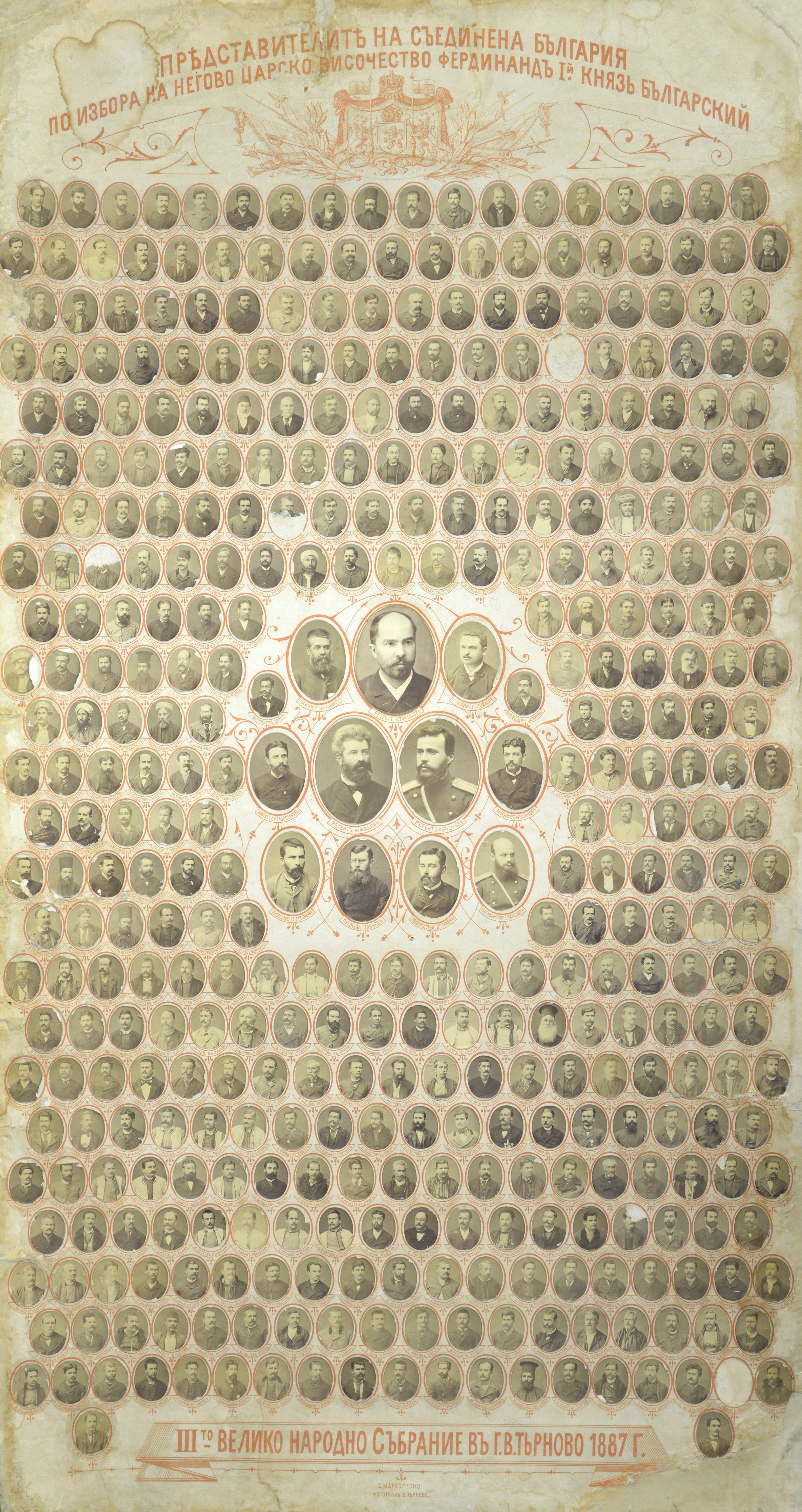 Представителите на съединена България по избора на Фердинанд І – княз български. ІІІ ВНС във Велико Търново 1887 г.